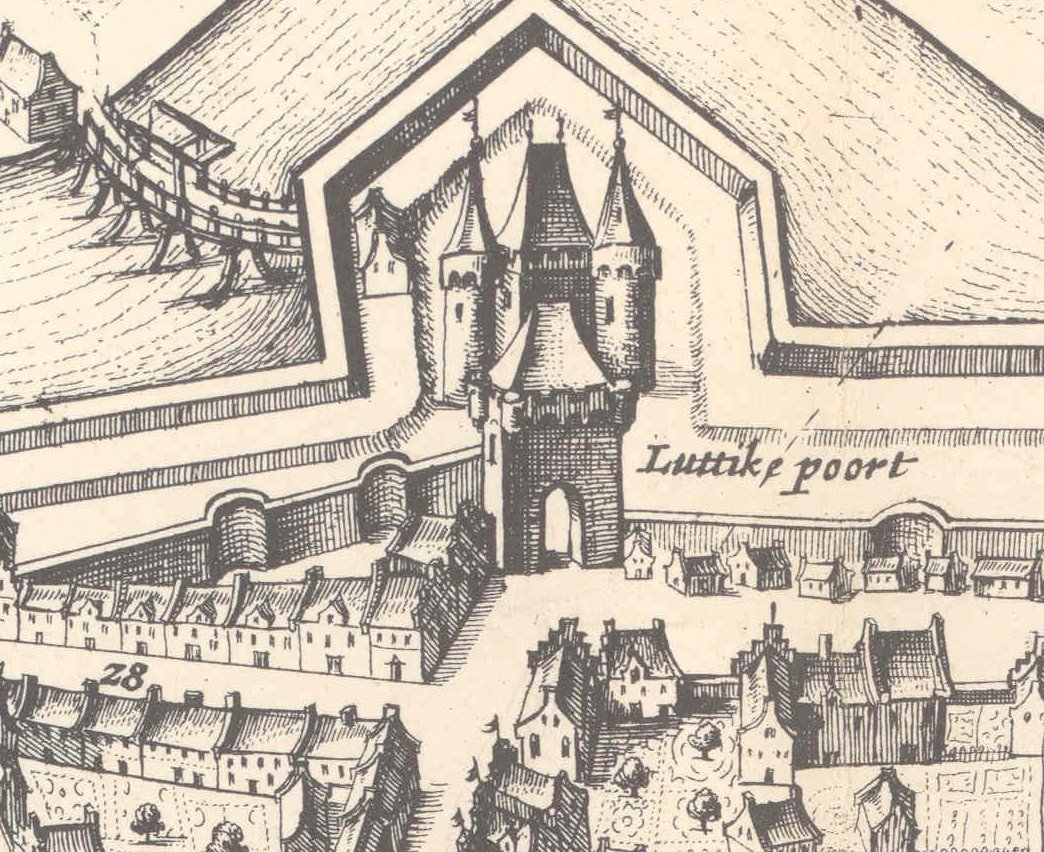 Prent uit fde 17e eeuw